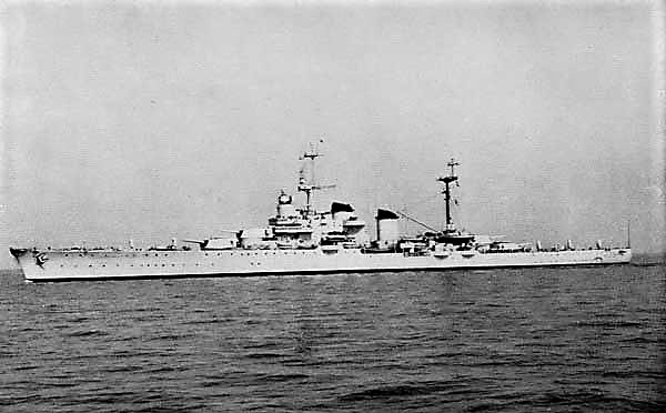 The cruiser Duca degli Abruzzi in navigation.